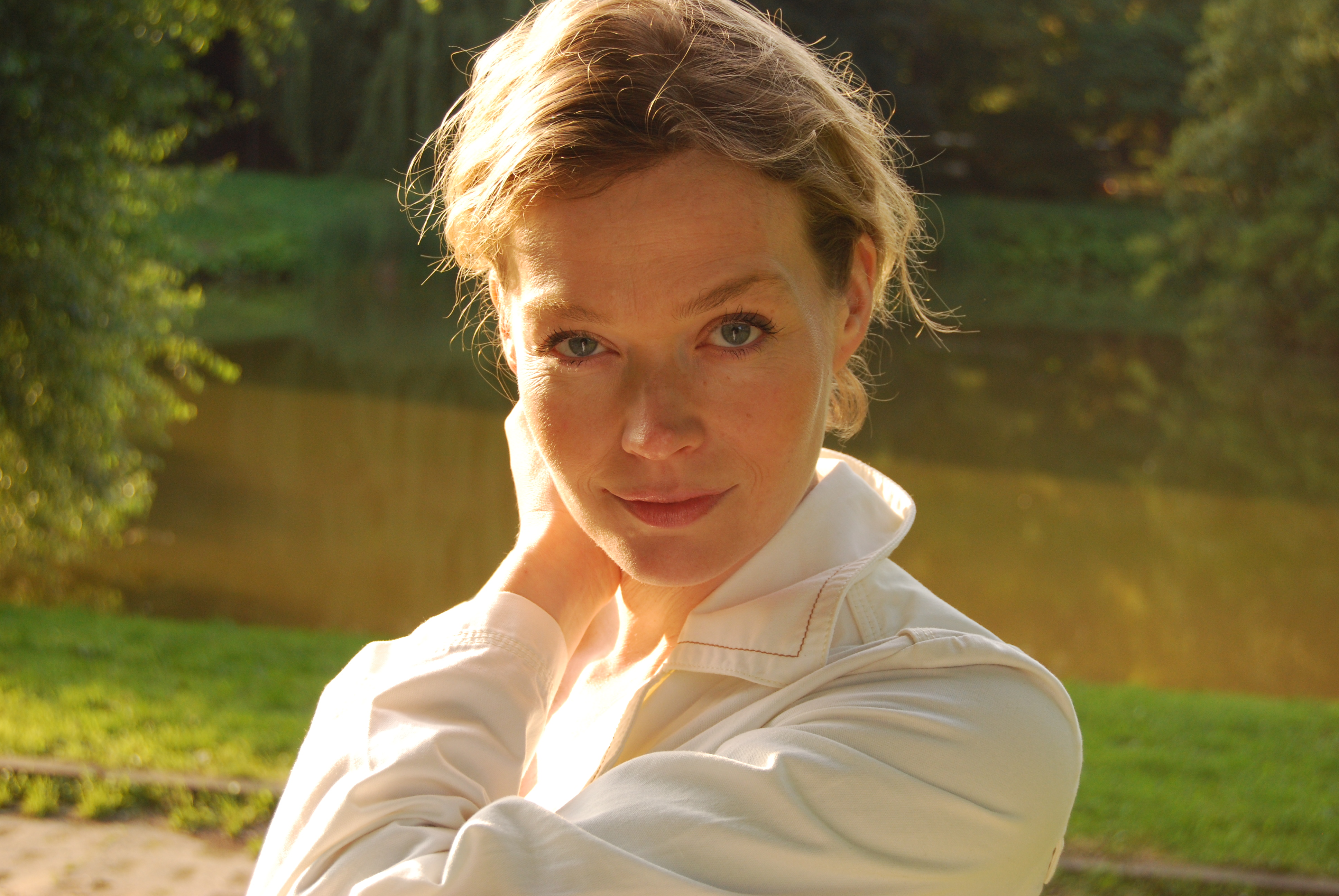 Tamara Arciuch, aktorka filmowa, teatralna.